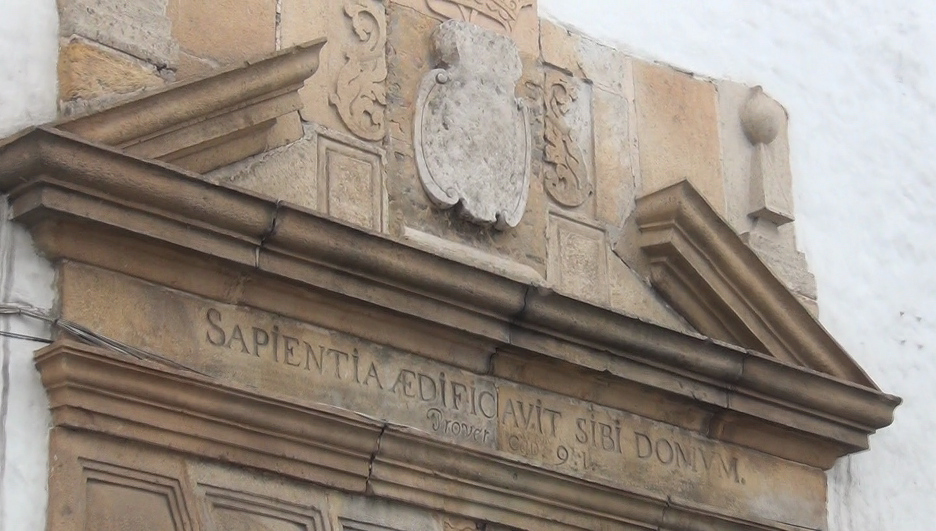 La Pontificia Universidad Javeriana tenía como sede en la colonia la "Casa de las Aulas", hoy Museo de Arte Colonial". En la actualidad aun se puede leer en el friso de esta emblemática puerta principal el lema que distingue a la Javeriana "Sapientia Aedificavit Sibi Domum", traducido "La Sabiduría Edificó su Casa".